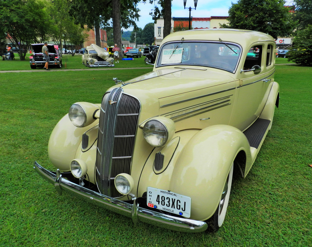 1935 Dodge 4-Door Sedan